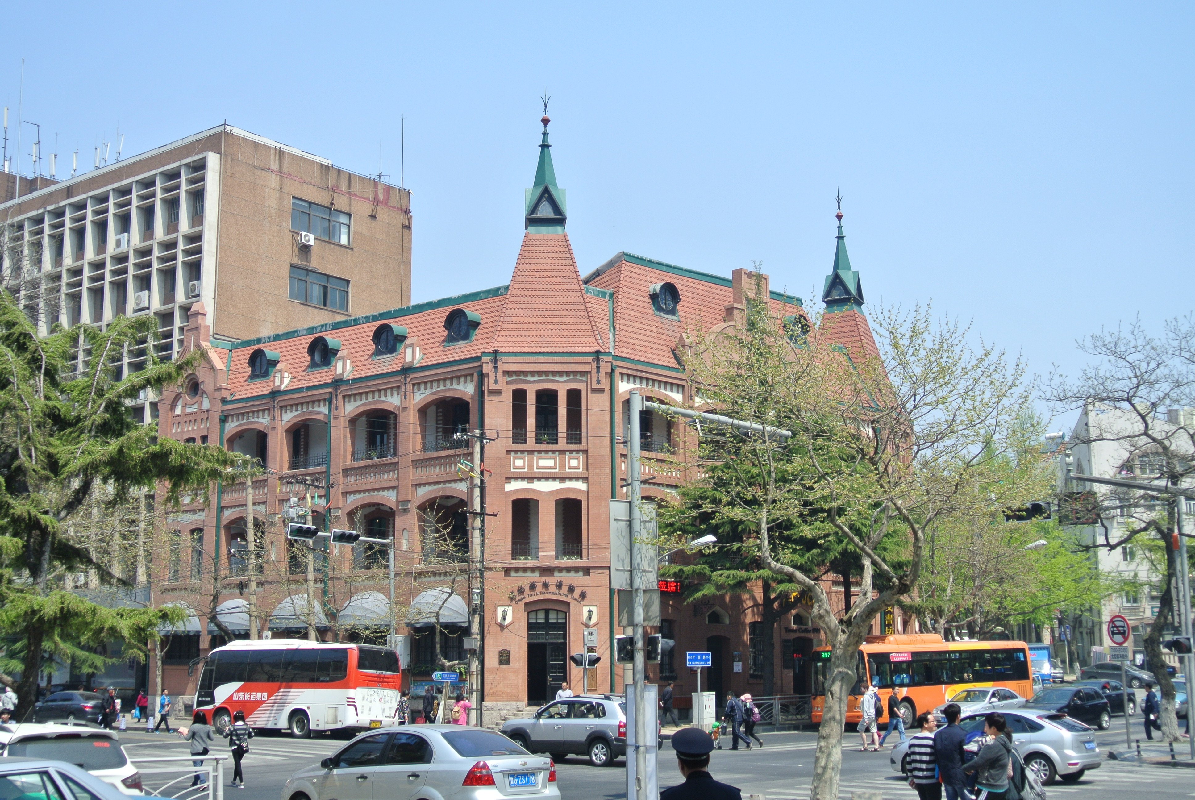 青岛邮电博物馆胶澳帝国邮局旧址